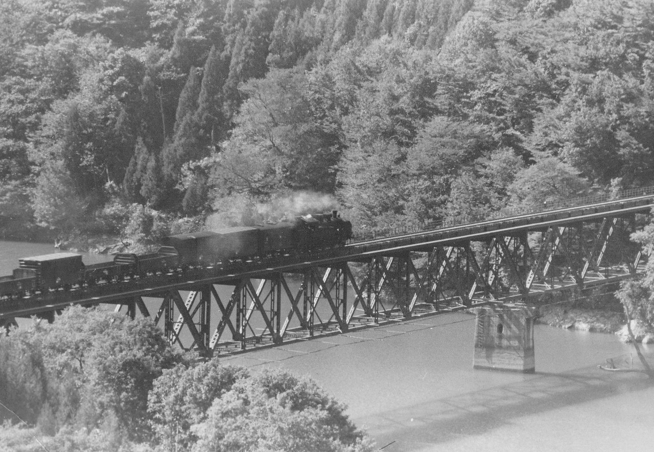 只見駅方面へ運行中のC11 289号機。会津若松機関区所属、1974年廃車。会津宮下駅付近にて。